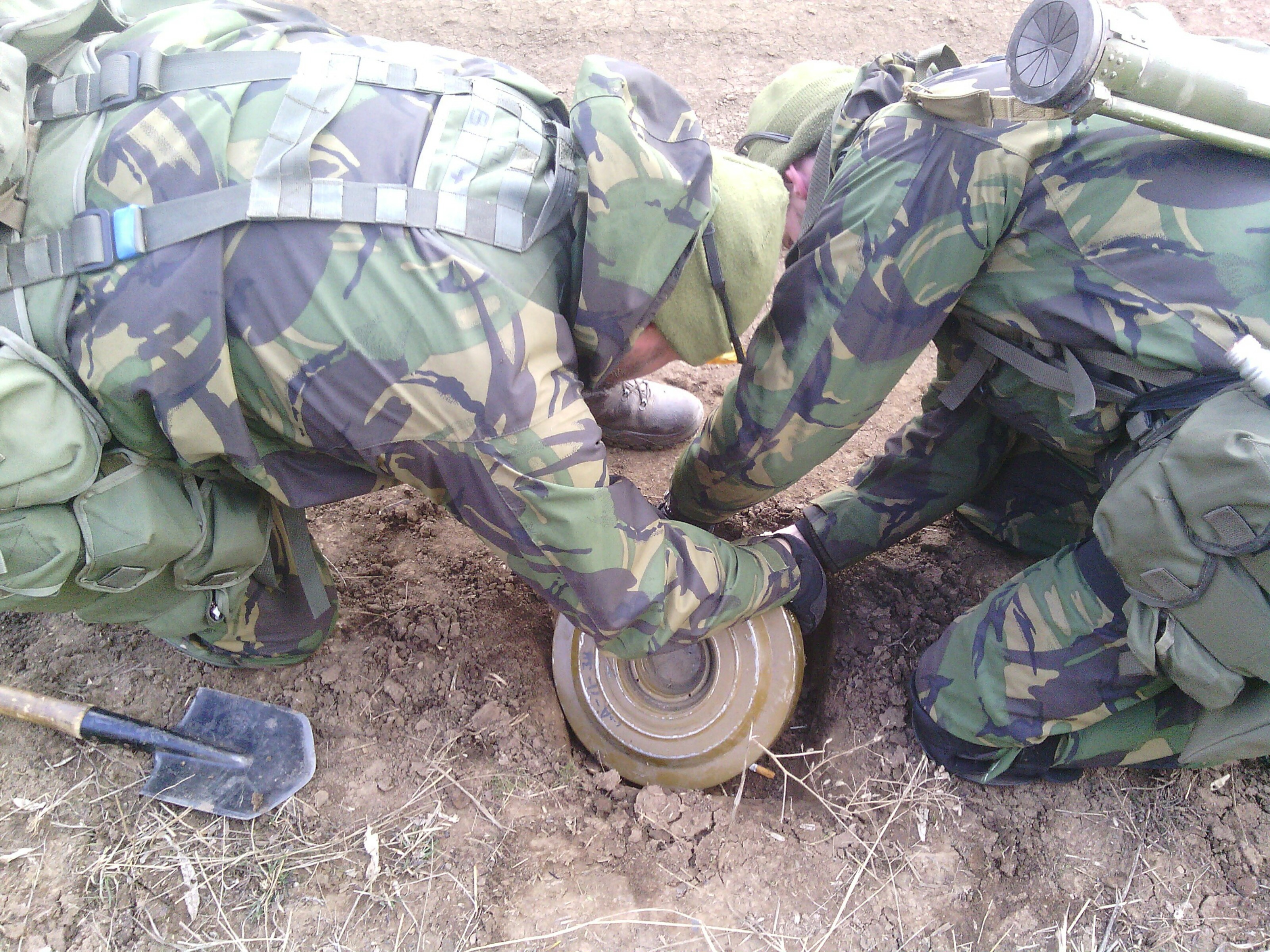 Бійці 8-го ОПСпП встановлюють протитанкову міну в зоні проведення антитерористичної операції. Фото зроблено в березні 2015 року під час війни на Сході України.